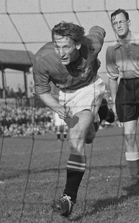 Collectie / Archief : Fotocollectie Anefo Reportage / Serie : [ onbekend ] Beschrijving : Zwitserland tegen Nederland 7-5 tweede Zwitsers doelpunt Datum : 15 oktober 1950 Trefwoorden : doelpunten Fotograaf : Winterbergen, […] / Anefo Auteursrechthebbende : Nationaal Archief Materiaalsoort : Glasnegatief Nummer archiefinventaris : bekijk toegang 2.24.01.09 Bestanddeelnummer : 904-2467